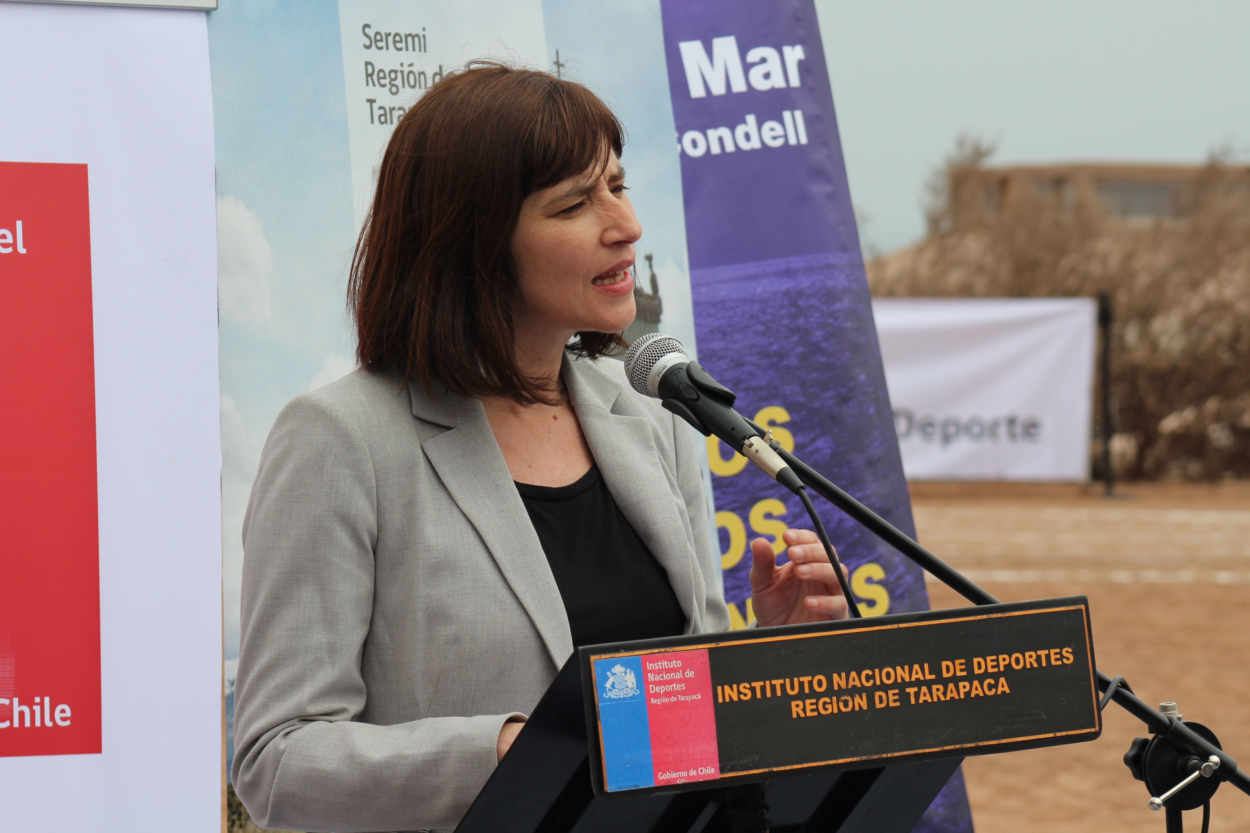 Natalia Riffo en visita a la región de Tarapacá.